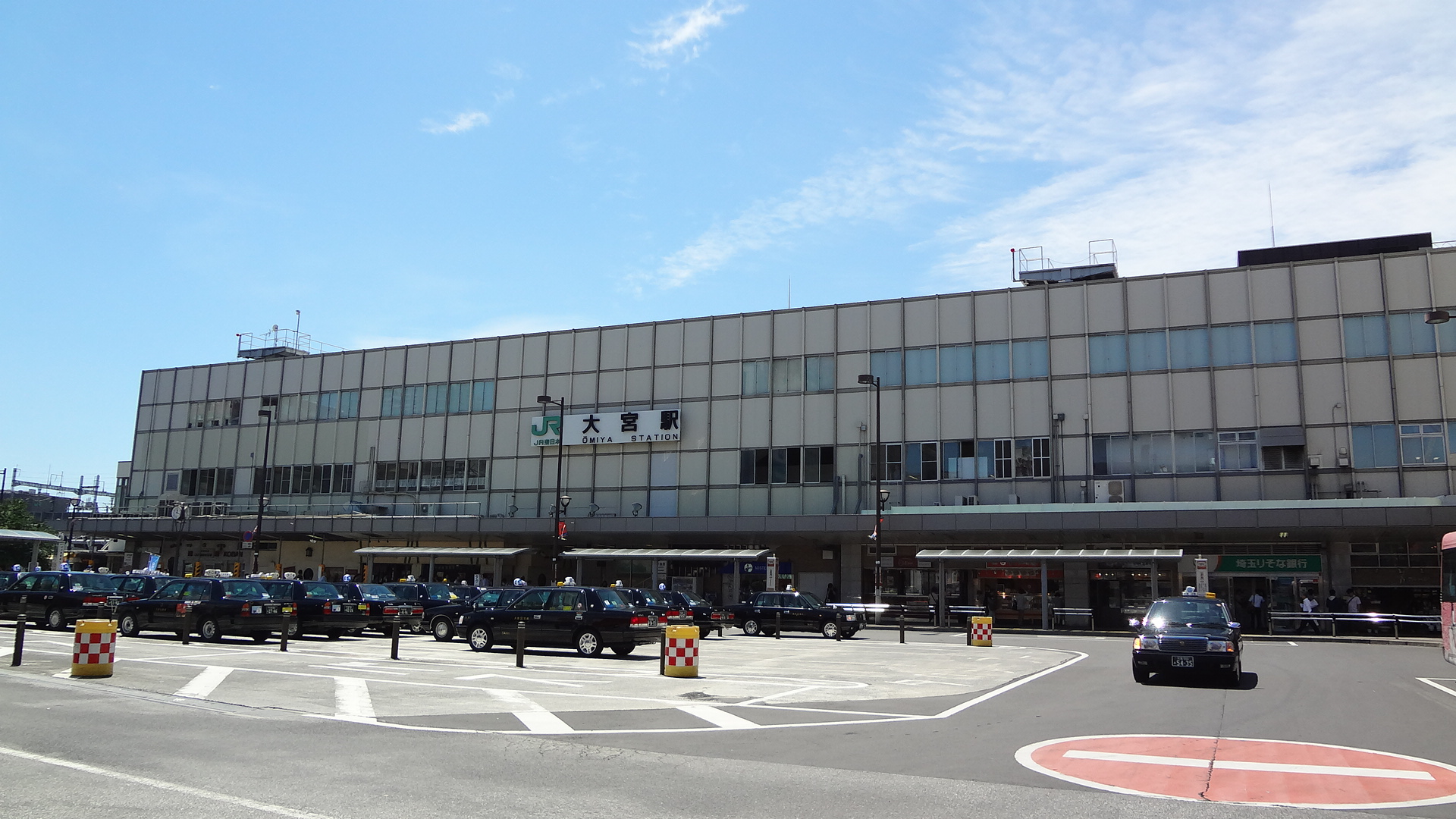 埼玉県さいたま市大宮区 JR大宮駅 東口 2014年8月11日撮影